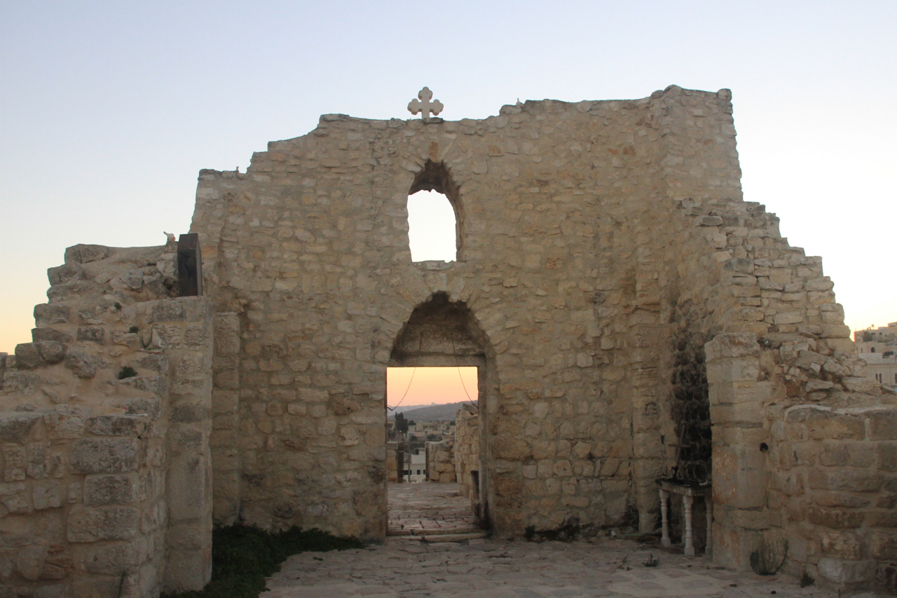 Taybeh, Palästina.